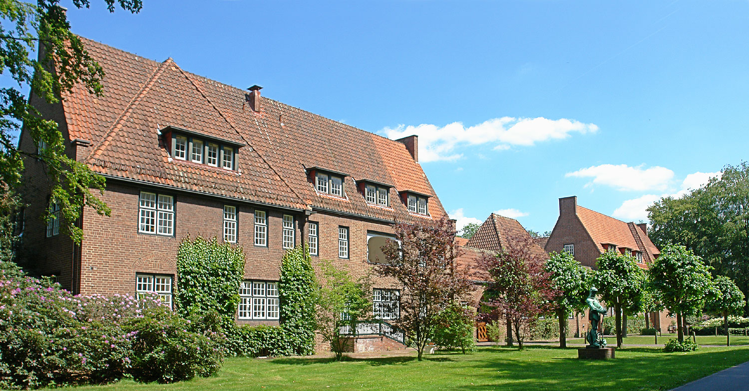 Egestorff-Stiftung in Bremen: Altenheim, Südseite. Architekten: Werner Heyberger und Diedrich Luley, erbaut: 1909/12 Das abgebildete Objekt ist ein geschütztes Kulturdenkmal in der Freien Hansestadt Bremen, mit der Nr. 0970,T beim Landesamt für Denkmalpflege registriert.